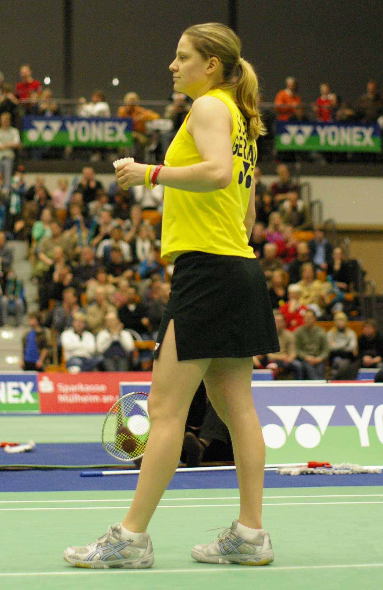 Juliane Schenk im Halbfinale der German Open 2008